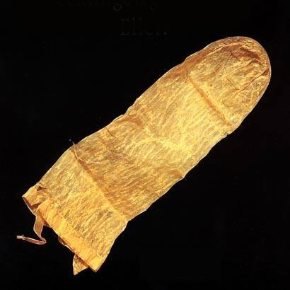 condom